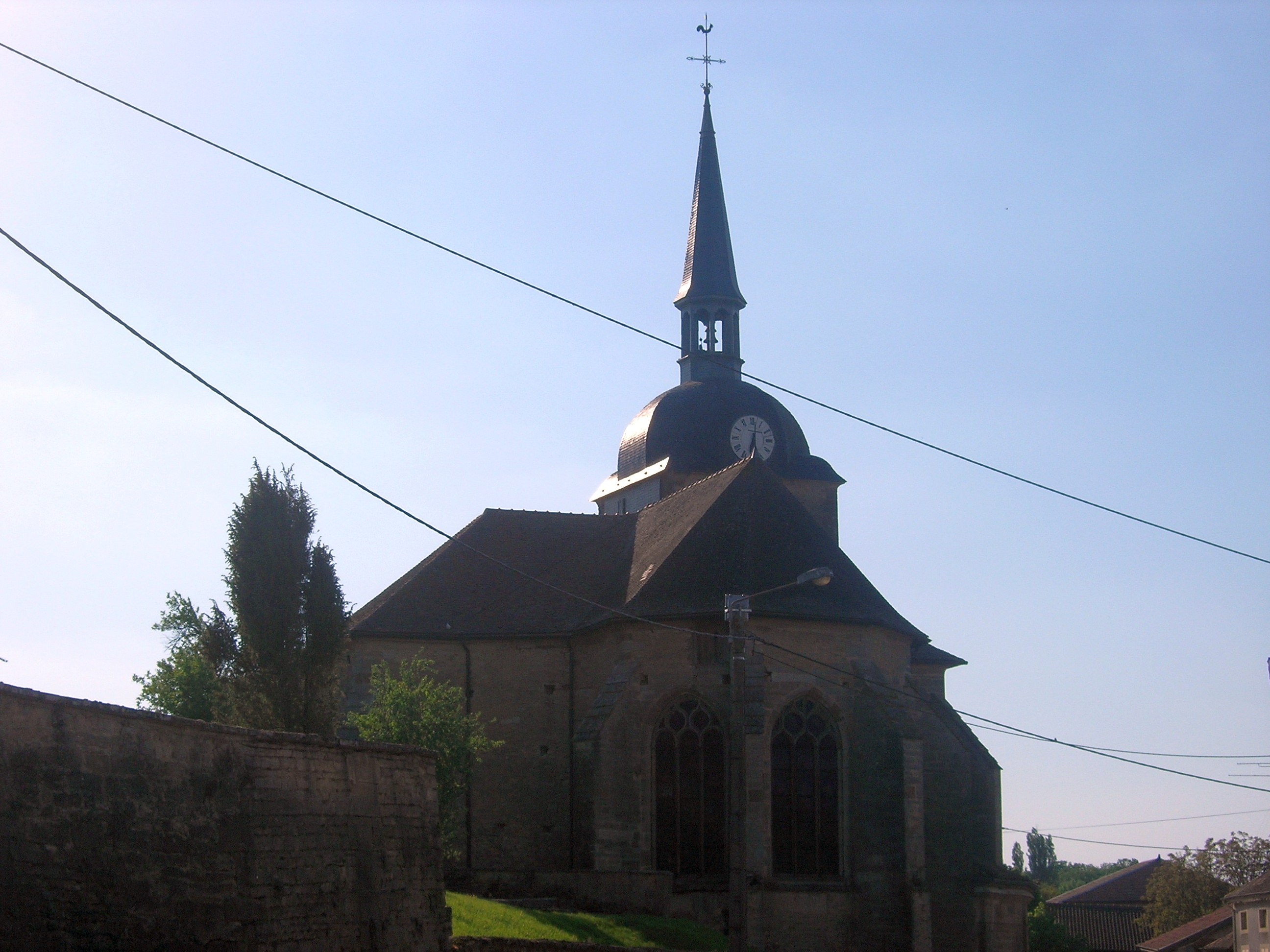 Eglise de Nully